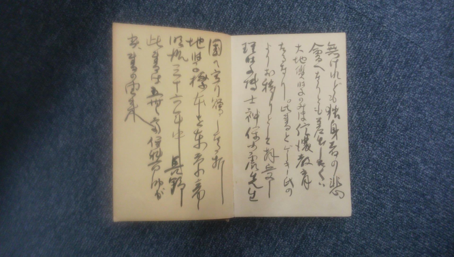 保科百助寄贈書より